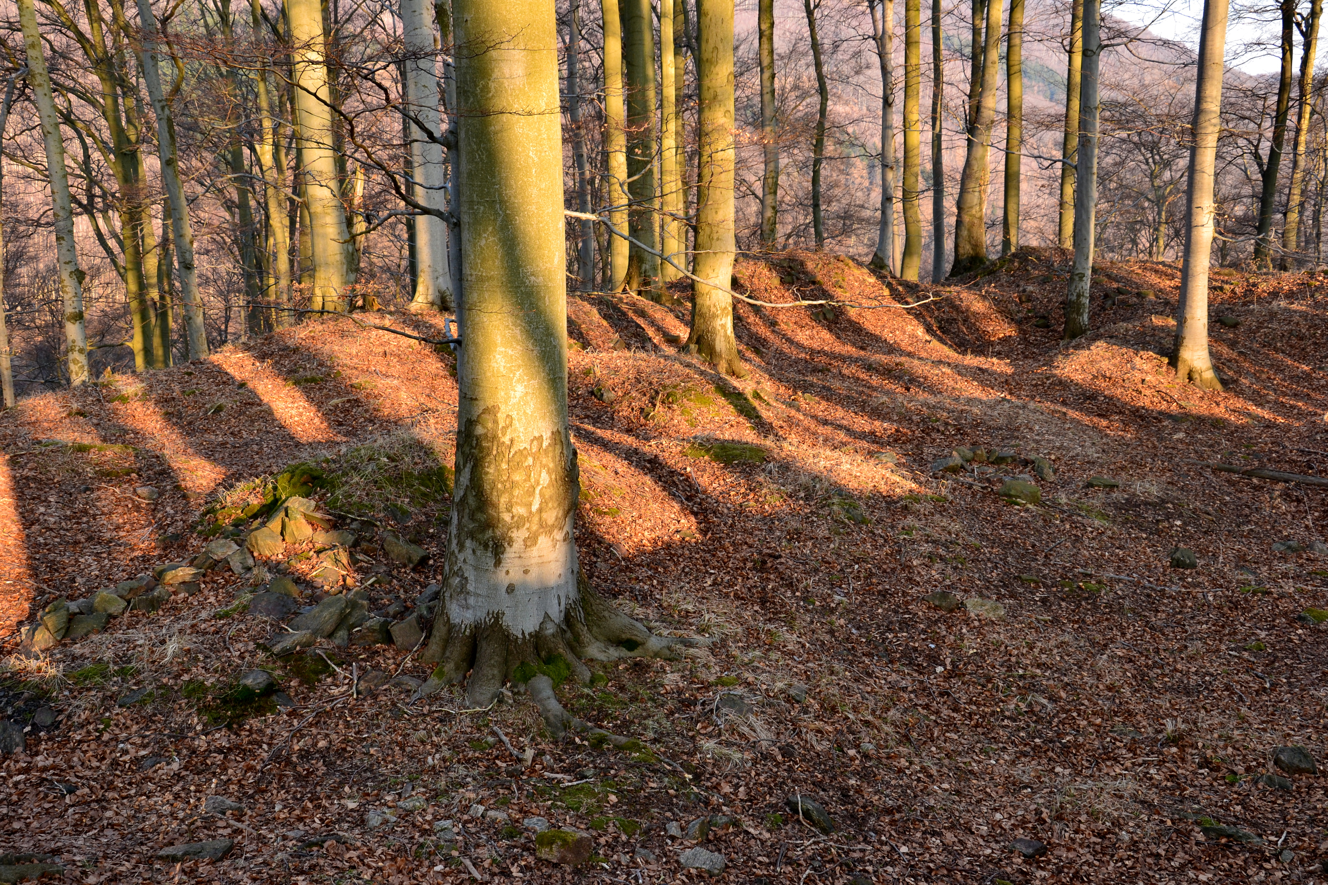 Nádvoří s relikty severního opevnění a hospodářské budovy